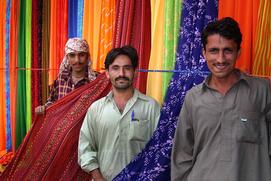 Pakistan, Karachi Textile Market